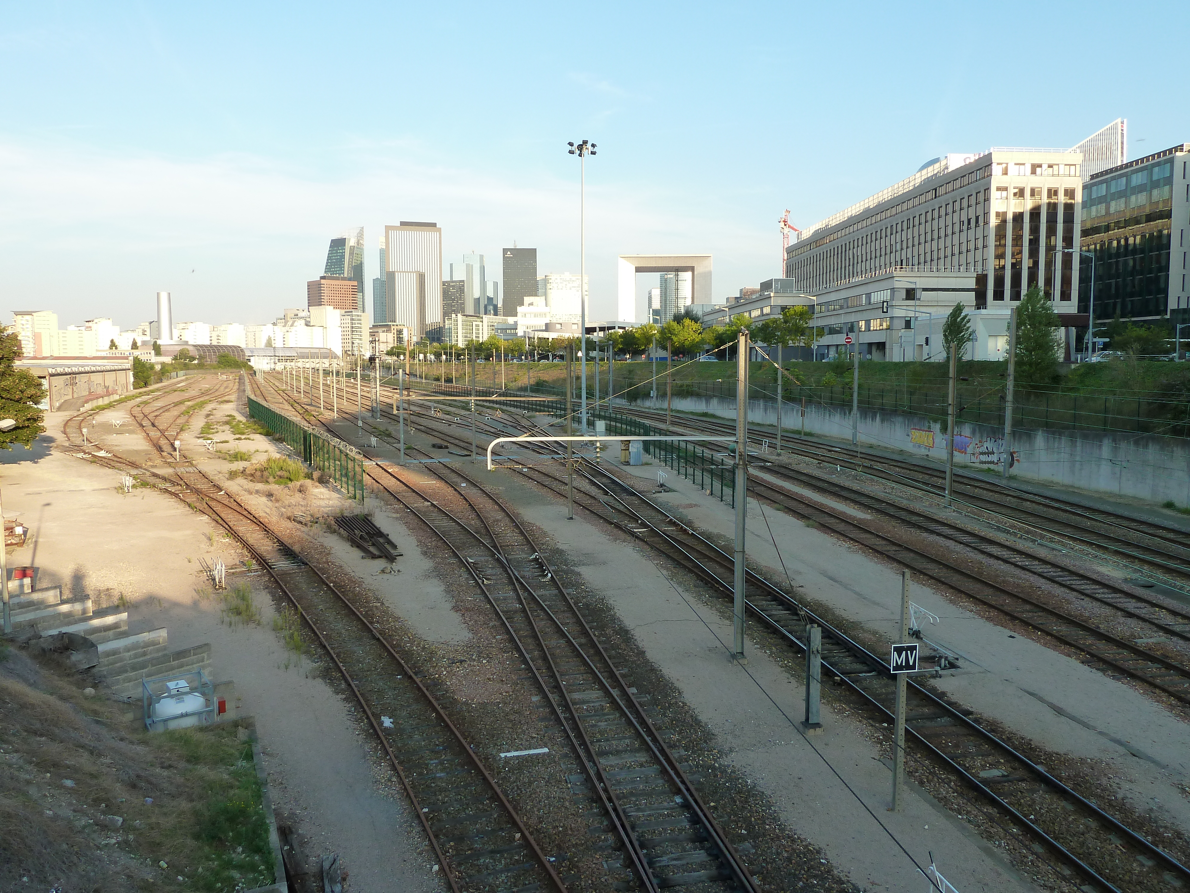 Vue des voies de Nanterre - La Folie depuis le pont de la rue de la Garenne à Nanterre, vers l'est.